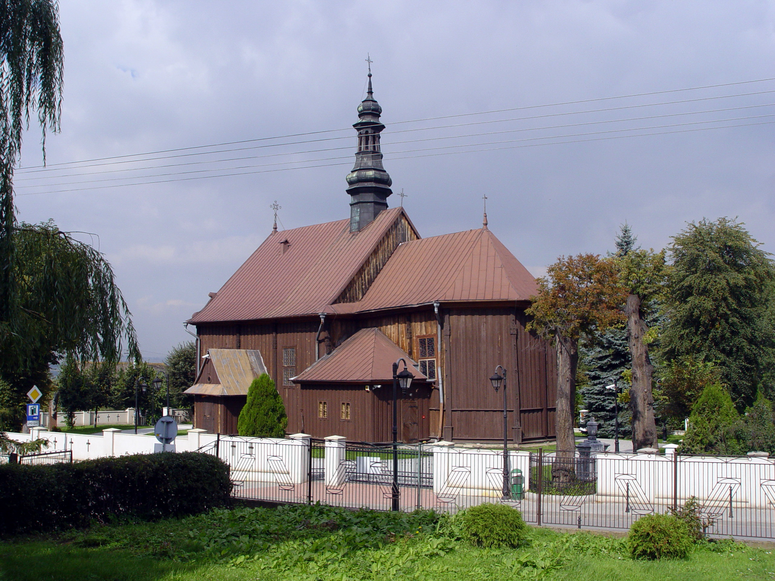 Więcławice Dworskie, kościół pw. św. Jakuba Apostoła, widok od południa.